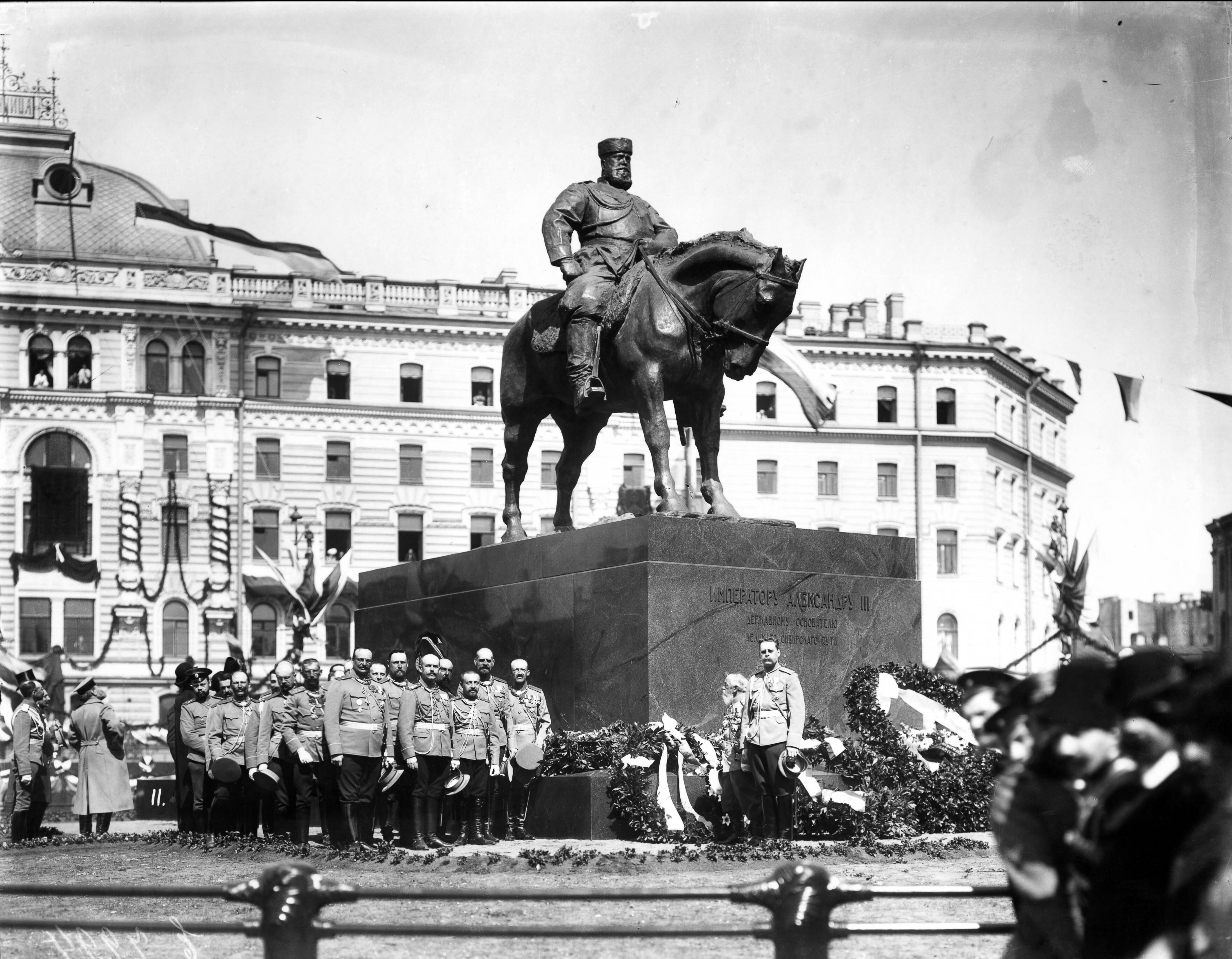 Открытие памятника Александру III 23 мая 1909 года на Знаменской (Восстания) площади в Санкт-Петербурге. В 1937 году памятник снят под предлогом реконструкции площади и помещен на хранение во двор Русского музея. 9 ноября 1994 установлен во дворе Мраморного дворца. Скульптор: Трубецкой.